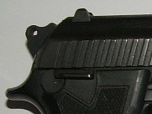 Detalhe cão - para acionamento necessita ação dupla